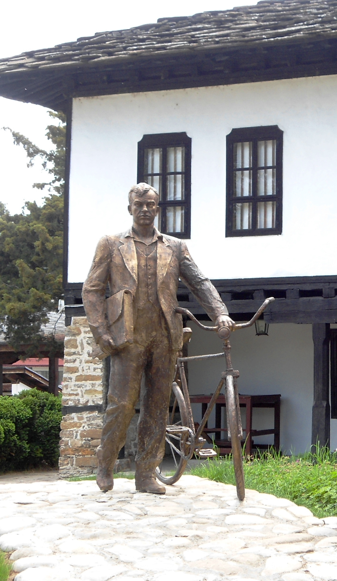 Паметник на Иван Хаджийски в гр.Троян